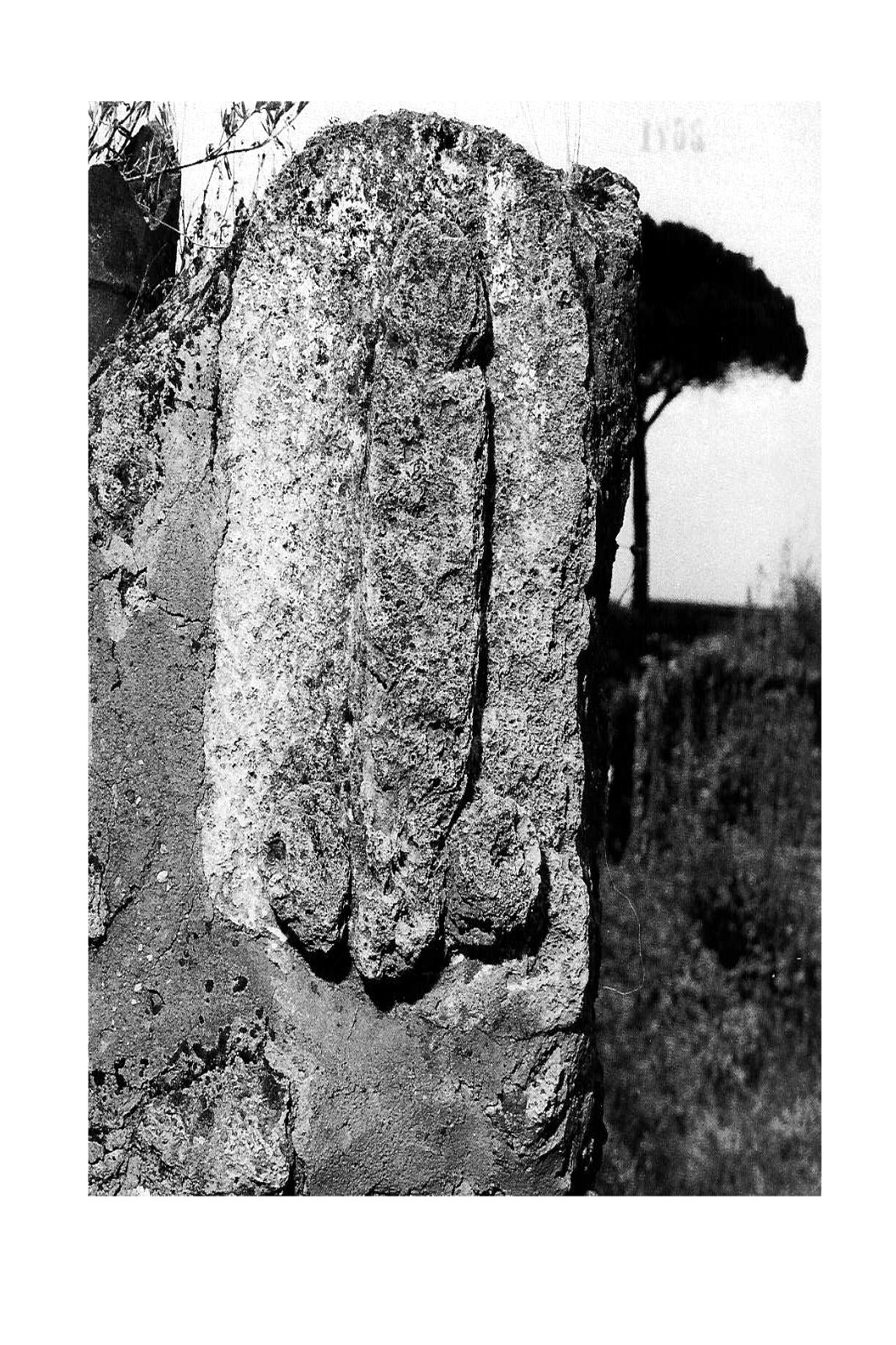 Falo pétreo de Pompeya